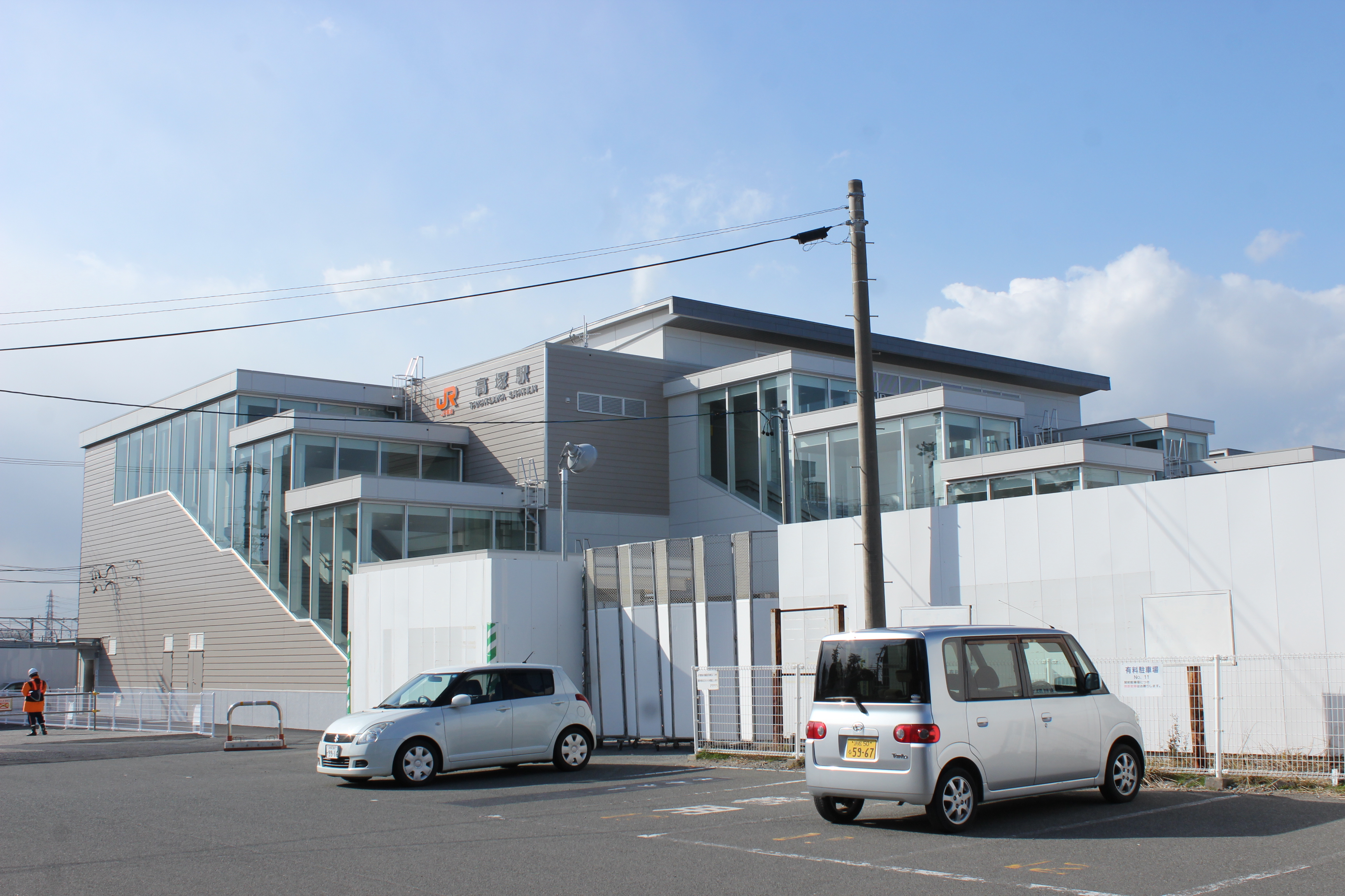 高塚駅新駅舎